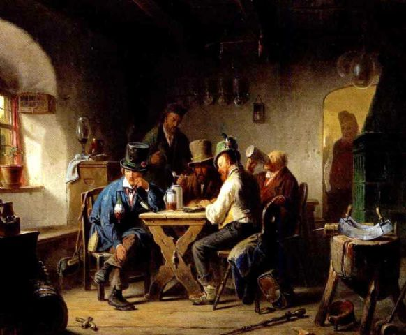 Das Heimweh